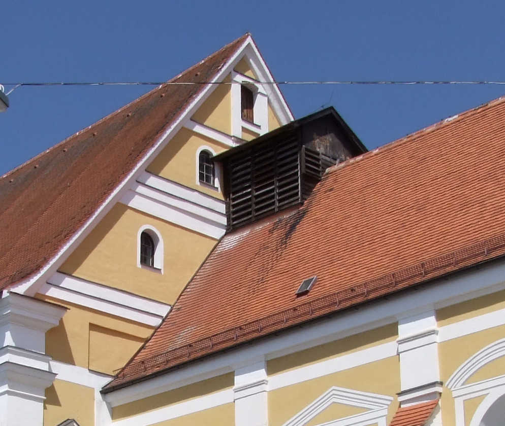 Mariä Verkündigung im oberschwäbischen Mindelheim. Ehemalige Augustiner, dann Jesuitenklosterkirche.